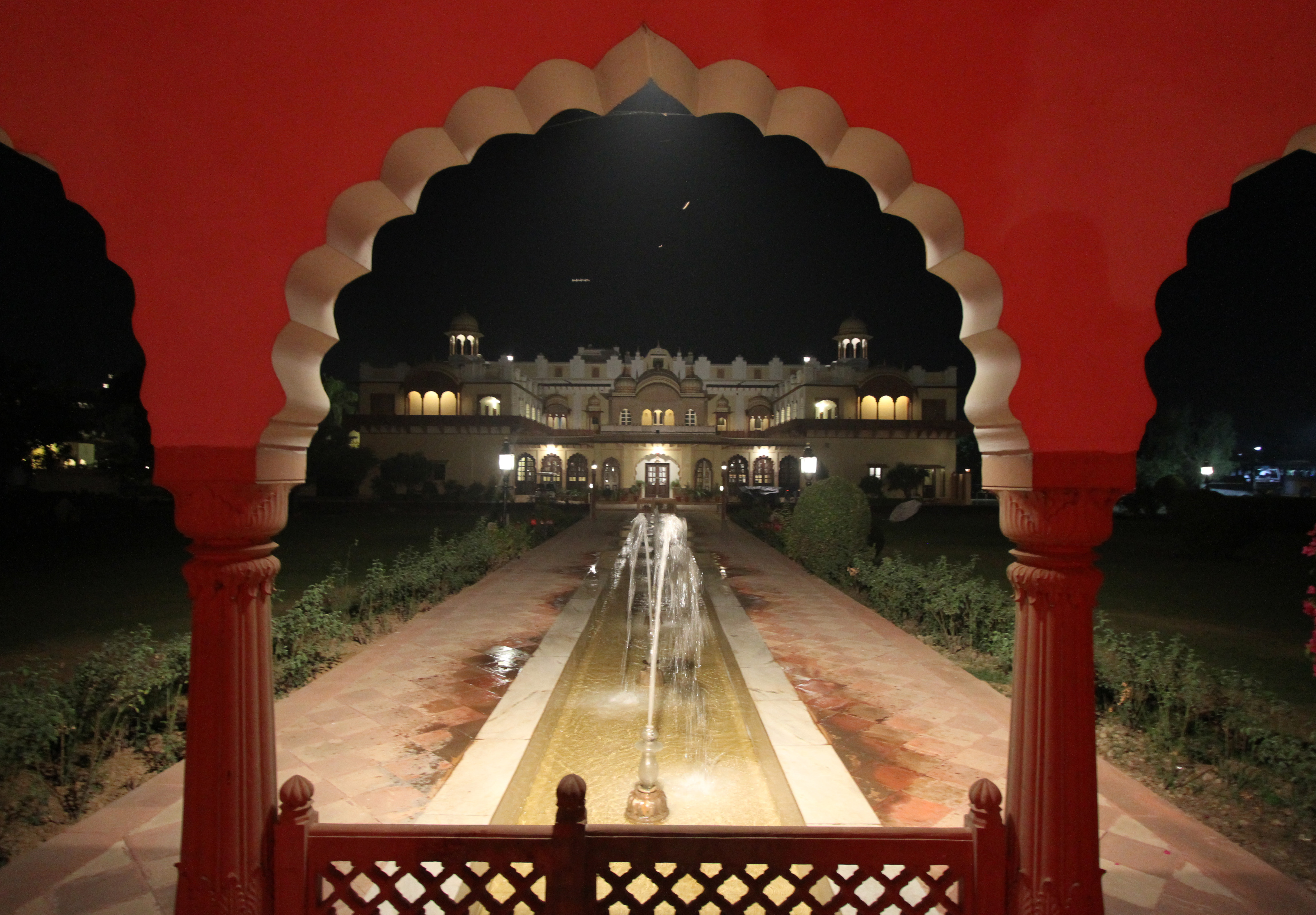 Laxmi Vilas Palace (Bharatpur)